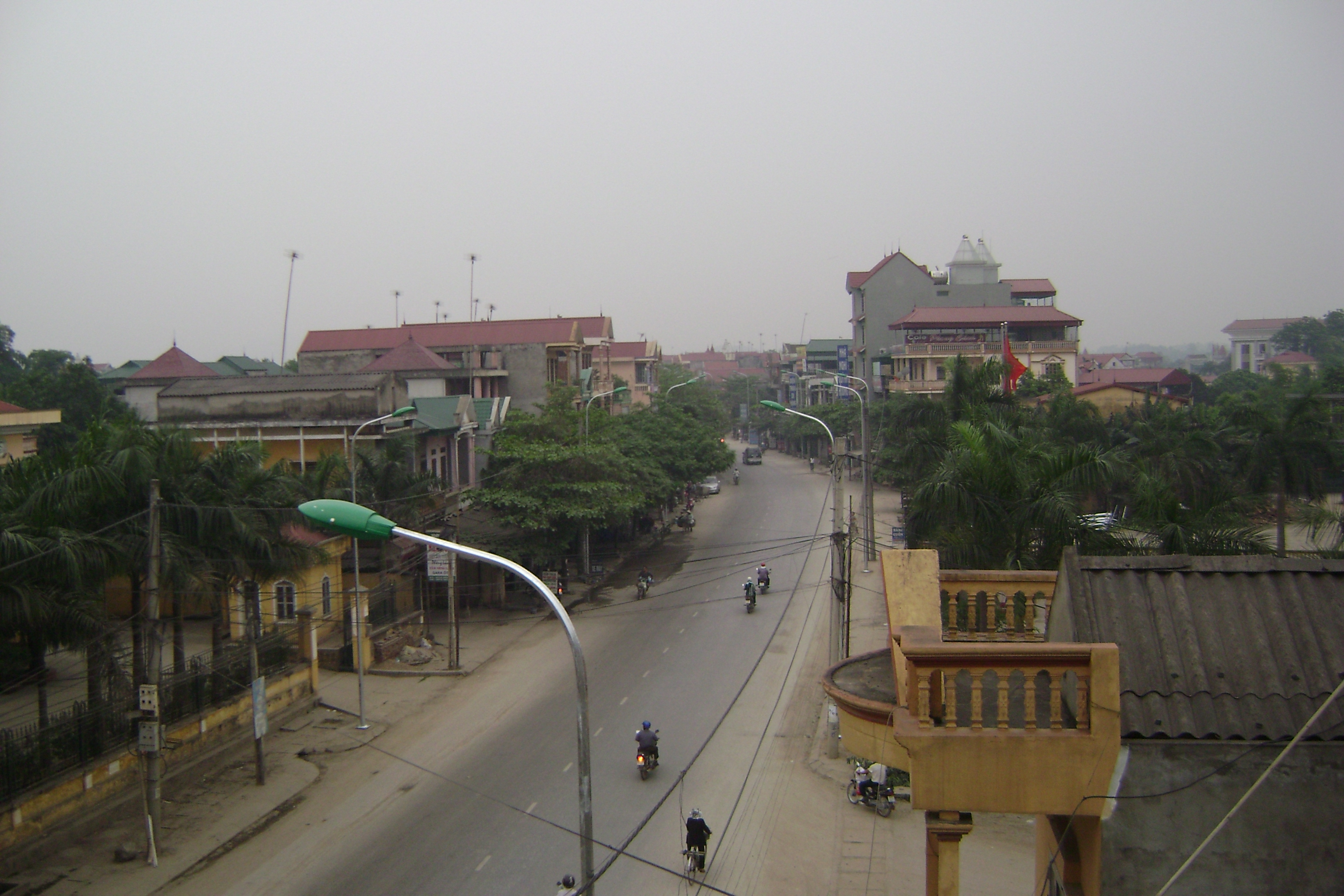 duong pho doan hung